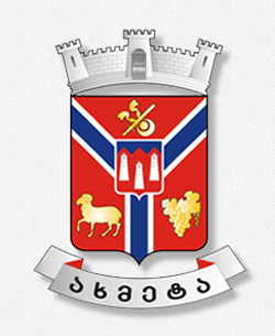 ახმეტის მუნიციპალიტეტის გერბი